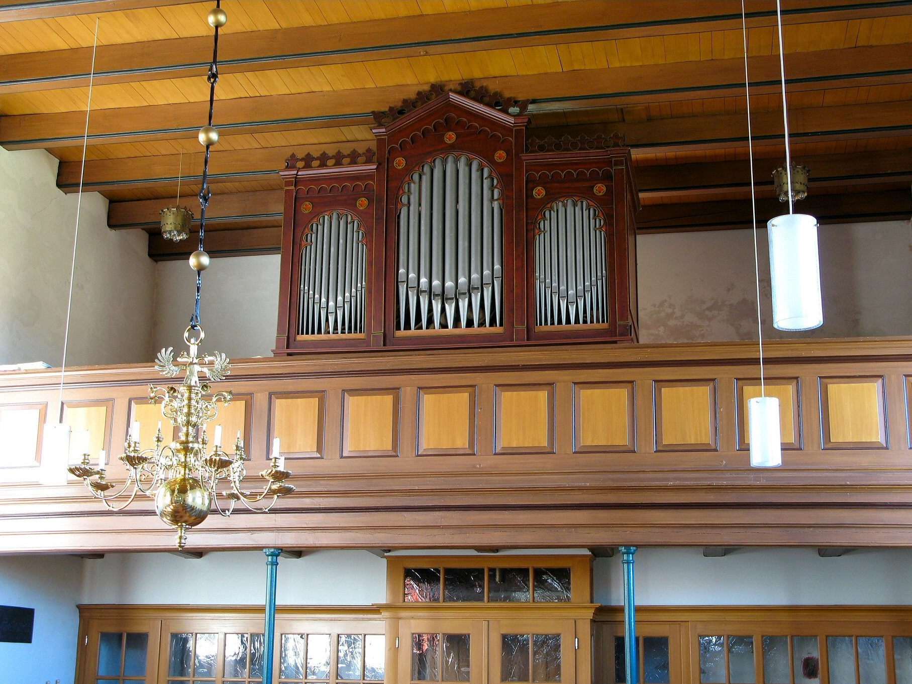 Orgel in Fulkum, Landkreis Wittmund